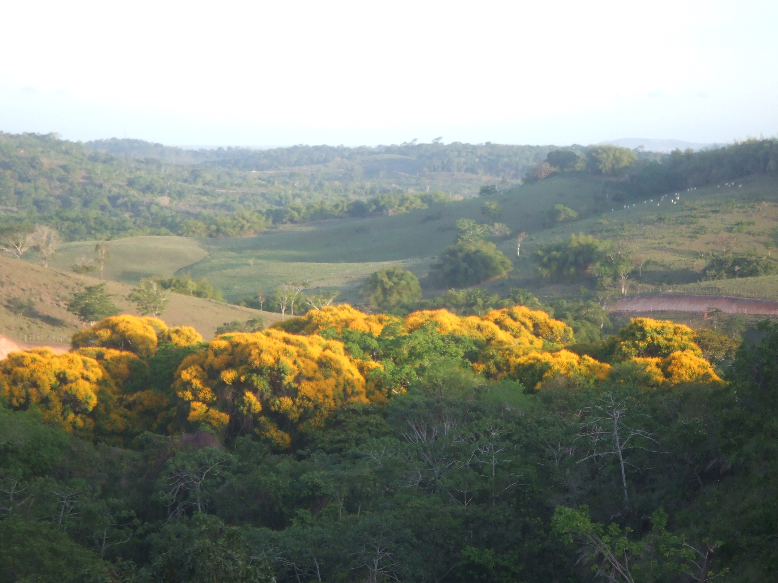 Mata Boa Cica